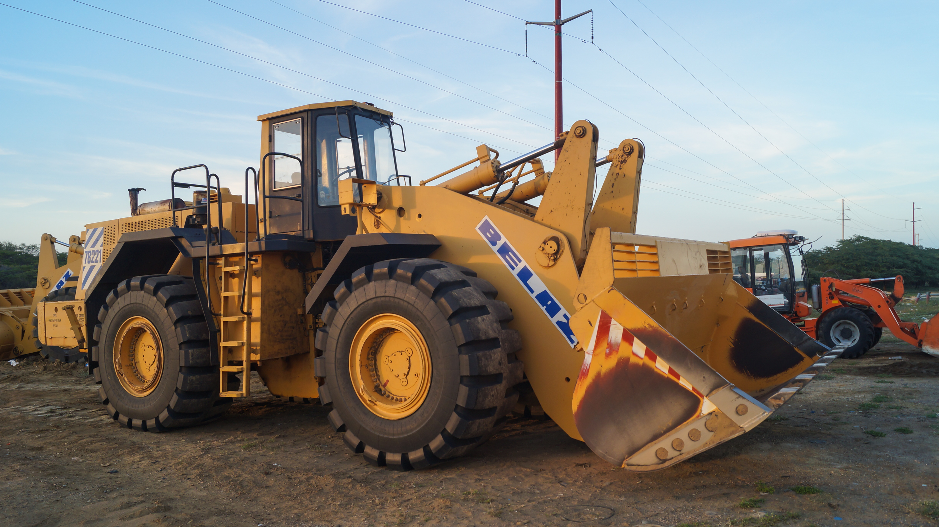 Belaz-78221